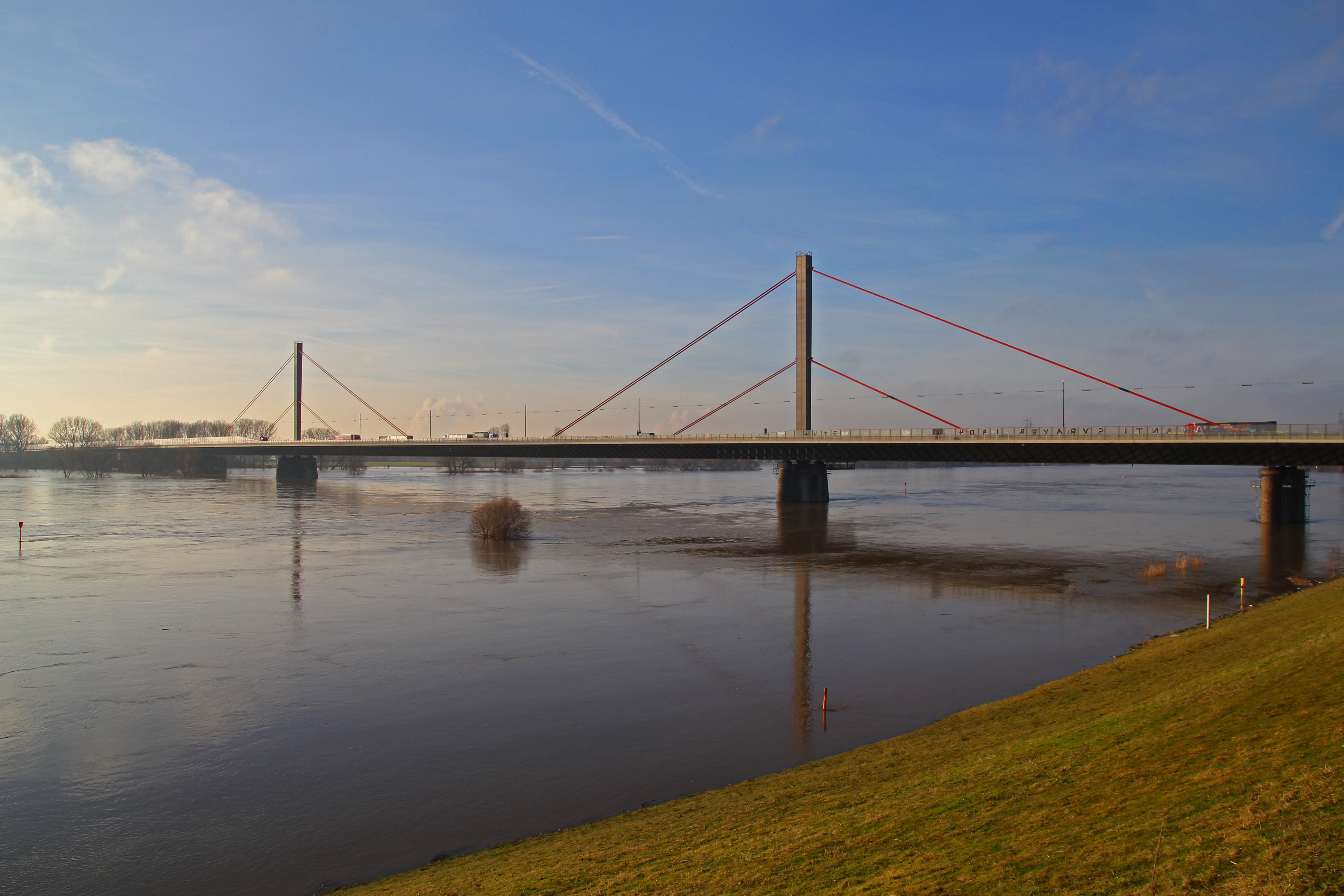 Der Rhein bei Leverkusen-Rheindorf während des Hochwassers im Januar 2011. Blick auf die Leverkusener Autobahnbrücke von Süden aus.Im Vordergrund befindet sich der überflutete Yachthafen.